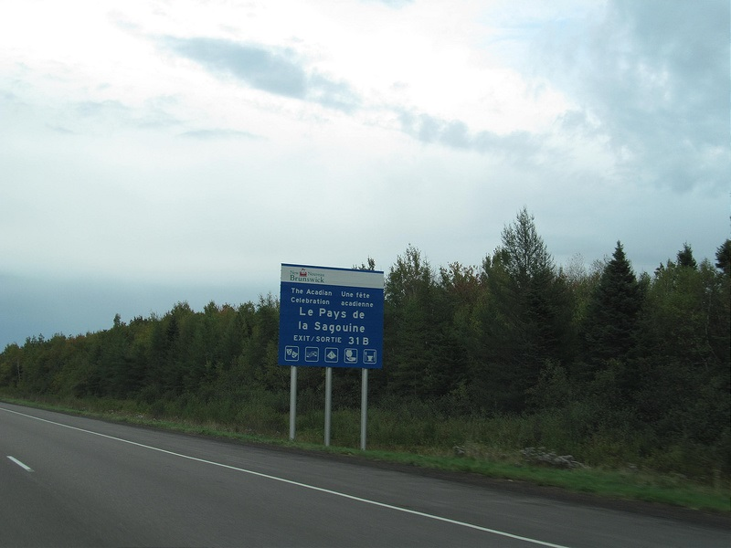 Le pays de La Sagouine, roman d'Antonine Maillet, qui se passe à Bouctouche en Acadie.